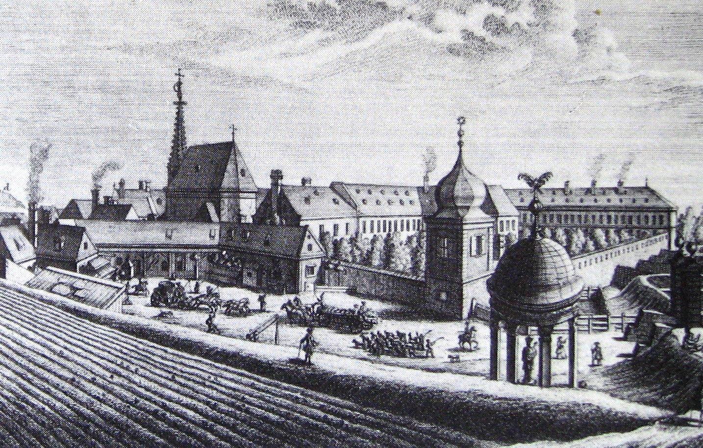 Wien Sankt Marxer Spital um 1724